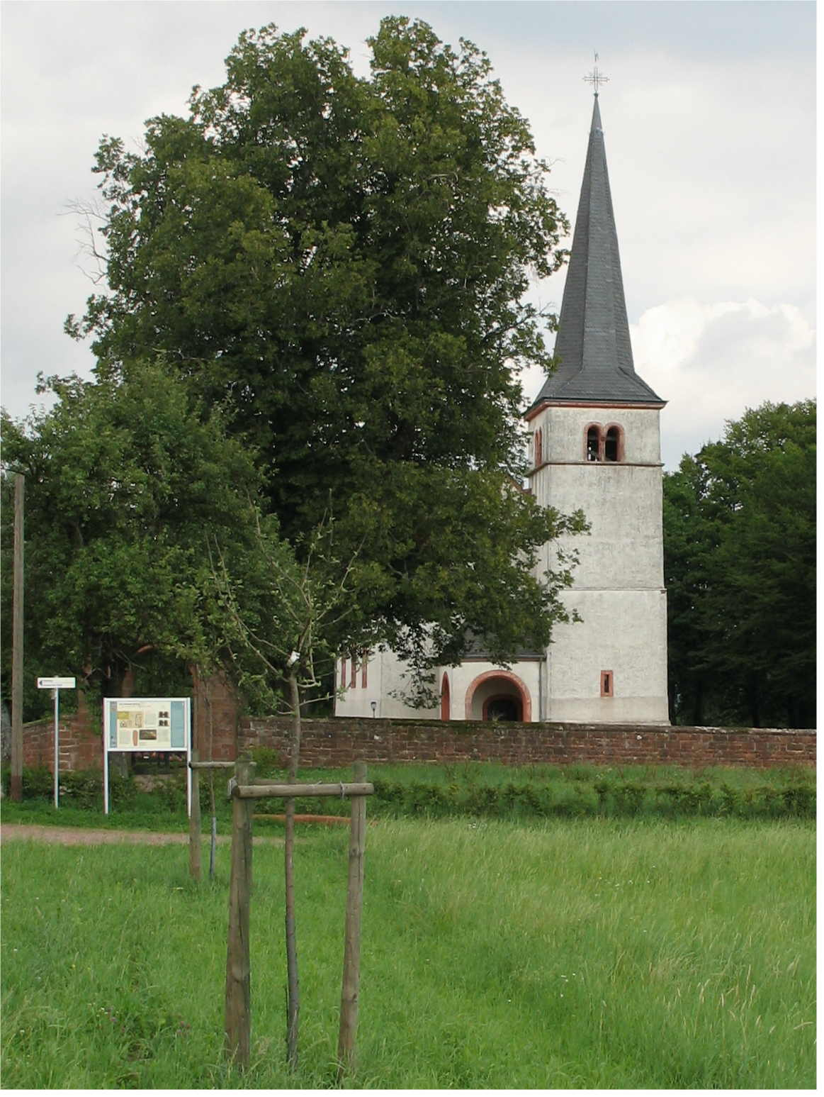 Déi al Kierch vu Kastel-Staadt